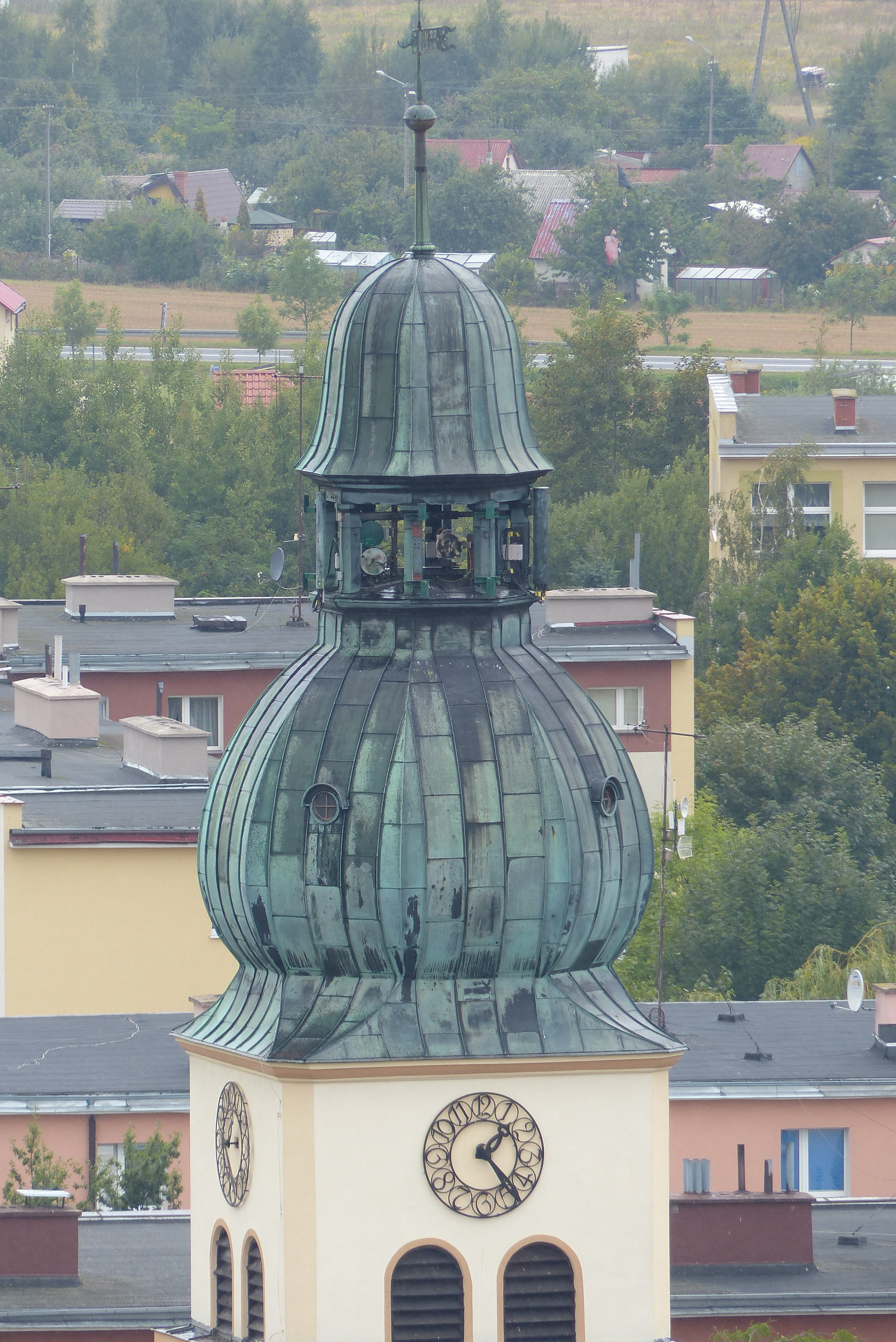 Człuchów, ul. Królewska 6 - rzymskokatolicki kościół parafialny p.w. św. Jakuba Apostoła, 1644-1647, 1926-1928